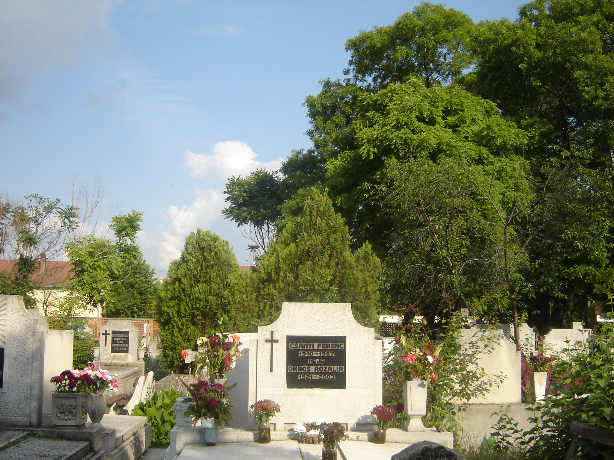 Felújított neobarokk sírkő legyezővel, egy negyed napsugár van a sírfelirat felett. A sírfelirat számára négyzet alakú helyet formáztak, ez klasszicizáló törekvésre utal (Szeged-alsóvárosi temető)